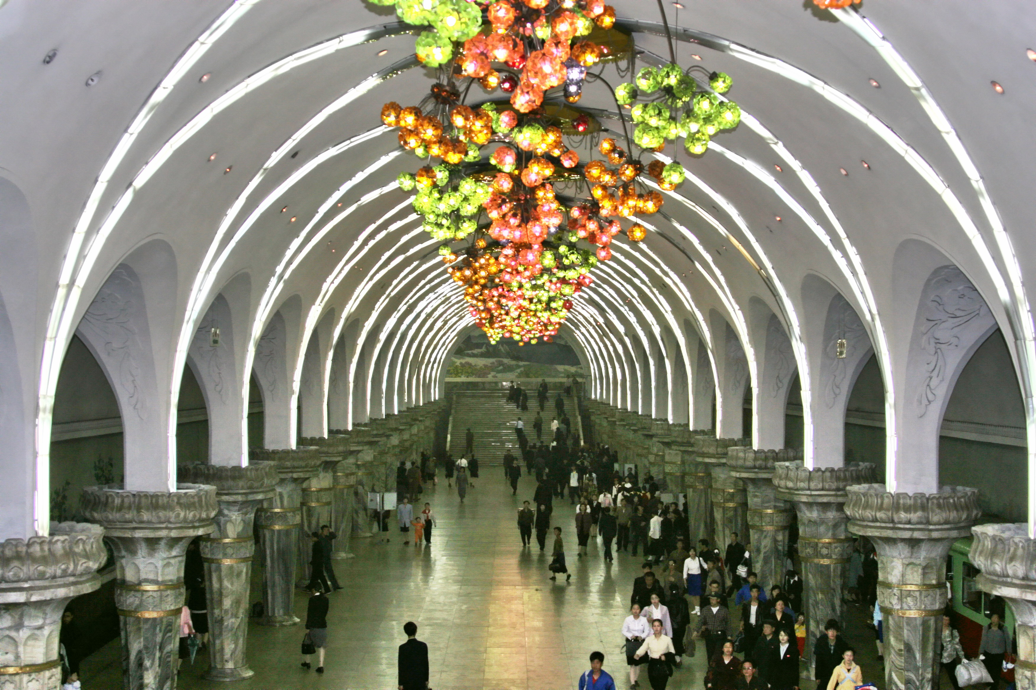 Pyongyang Metro